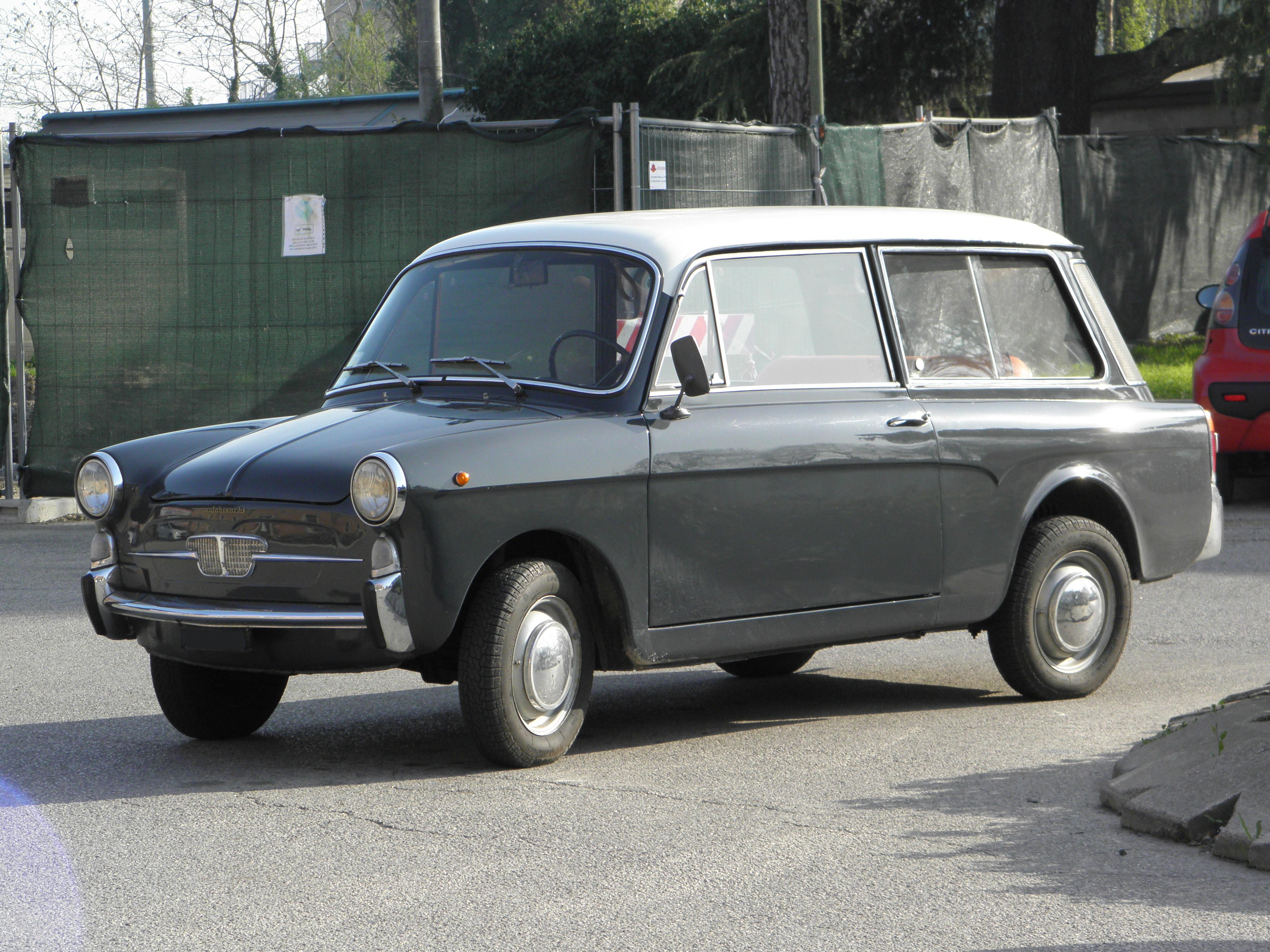 Autobianchi Bianchina Panoramica fotografata in sosta nei pressi della stazione ferroviaria di Rovigo.